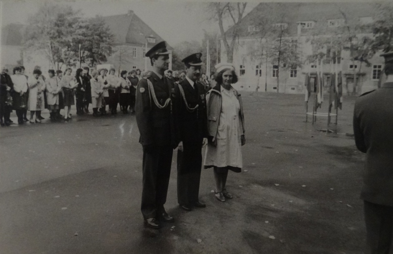 Stargard Szczeciński - Dzień Wojska Polskiego w 45 Batalionie Medycznym